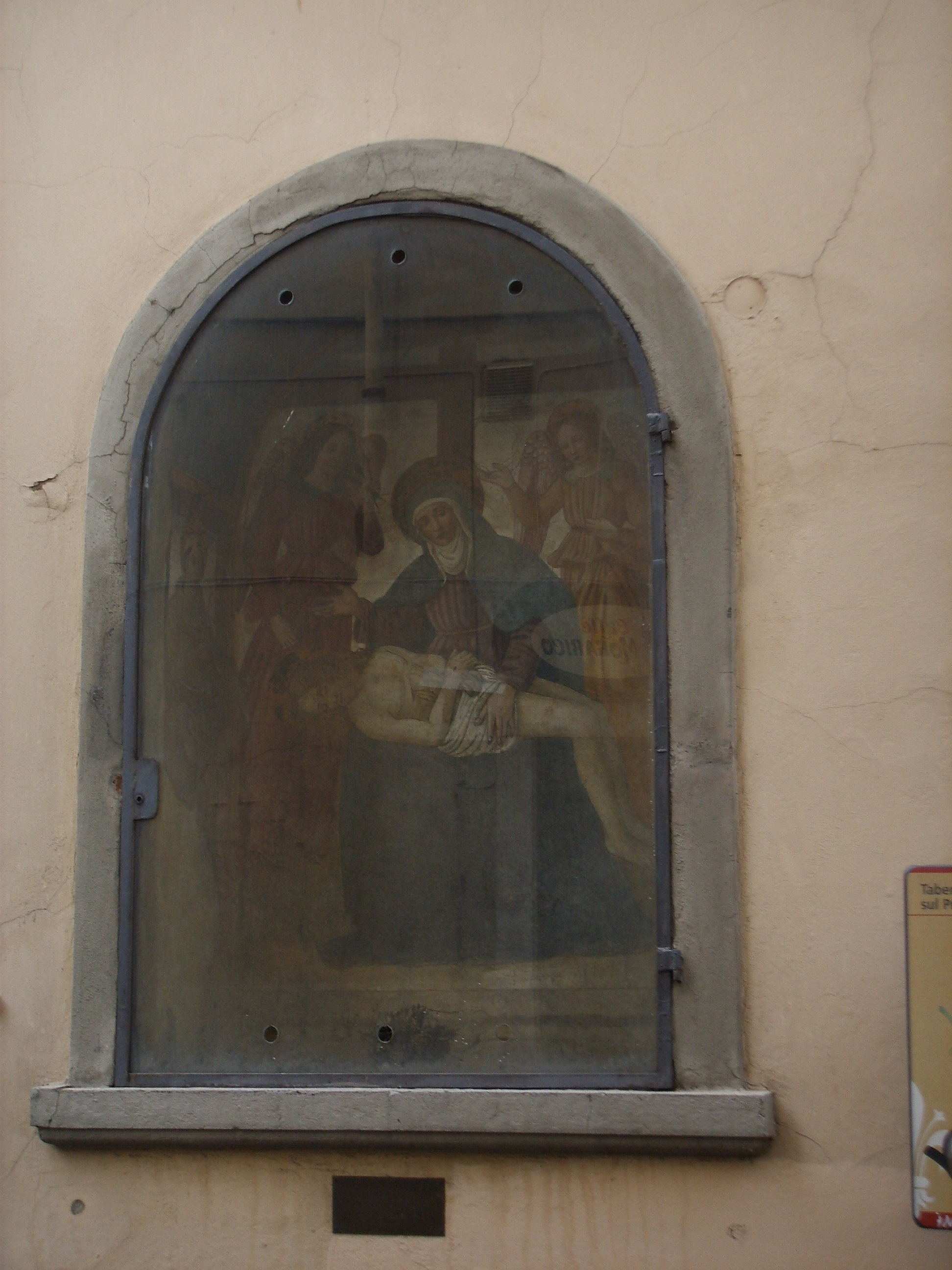 Santa Lucia sul Prato church, outside, Tabernacolo, Florence, Italy